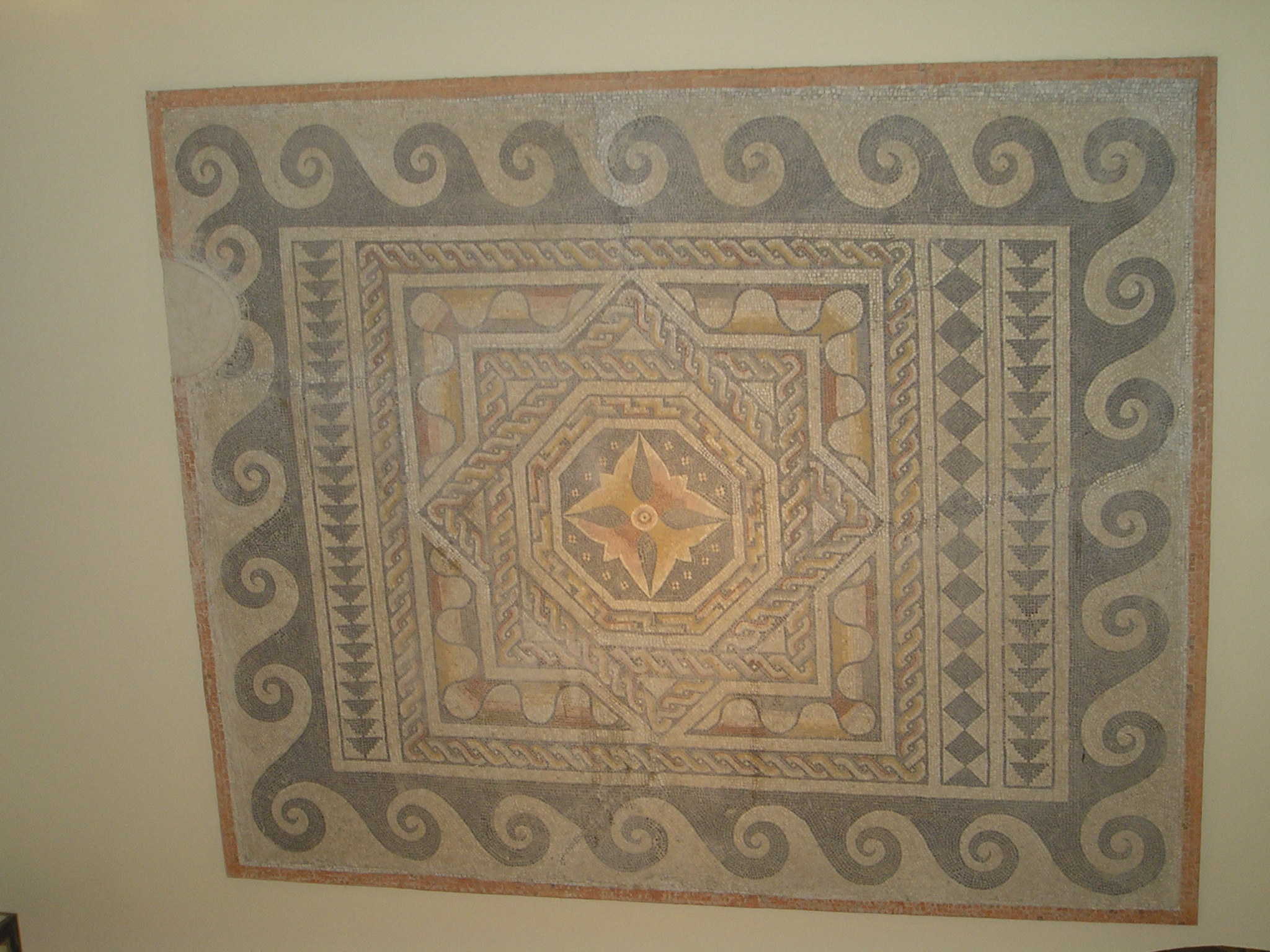 Mosaico geométrico polícromo del siglo IV procedente de la Villa de las Tiendas en Emerita Augusta, Mérida (Badajoz), depositado actualmente en el Museo Arqueológico Provincial de Badajoz.